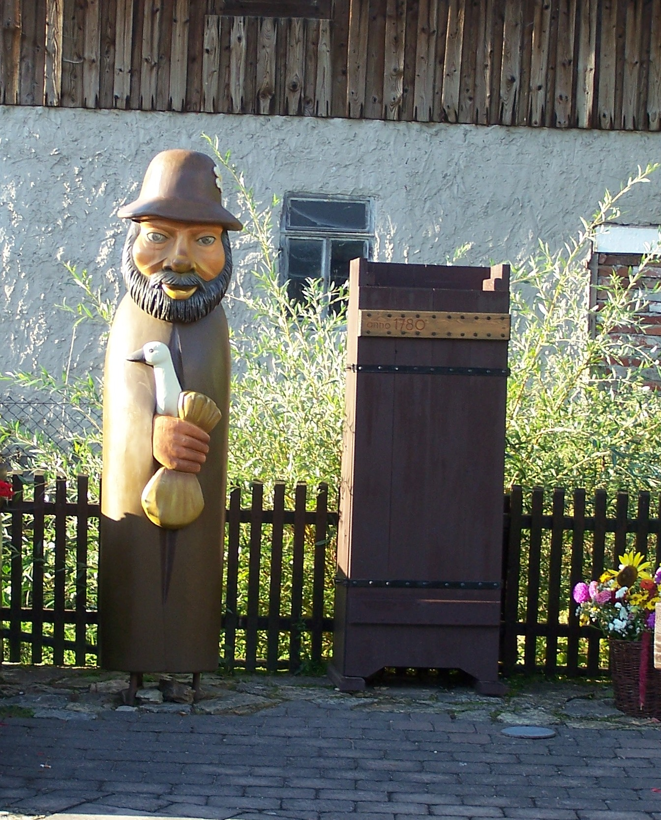 Holzskulptur Rhön-Paulus - in der Ortslage Glattbach.